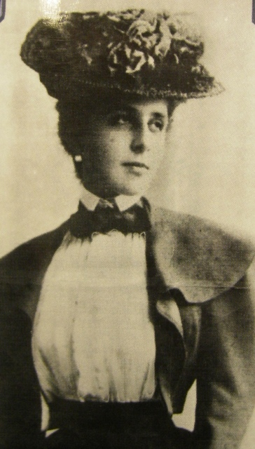 М.К.Морозова, иллюстрация из книги: Андрей Белый: Ваш рыцарь: Письма к М. К. Морозовой. 1901—1928. — Издательство «Прогресс-Плеяда», М., 2006.